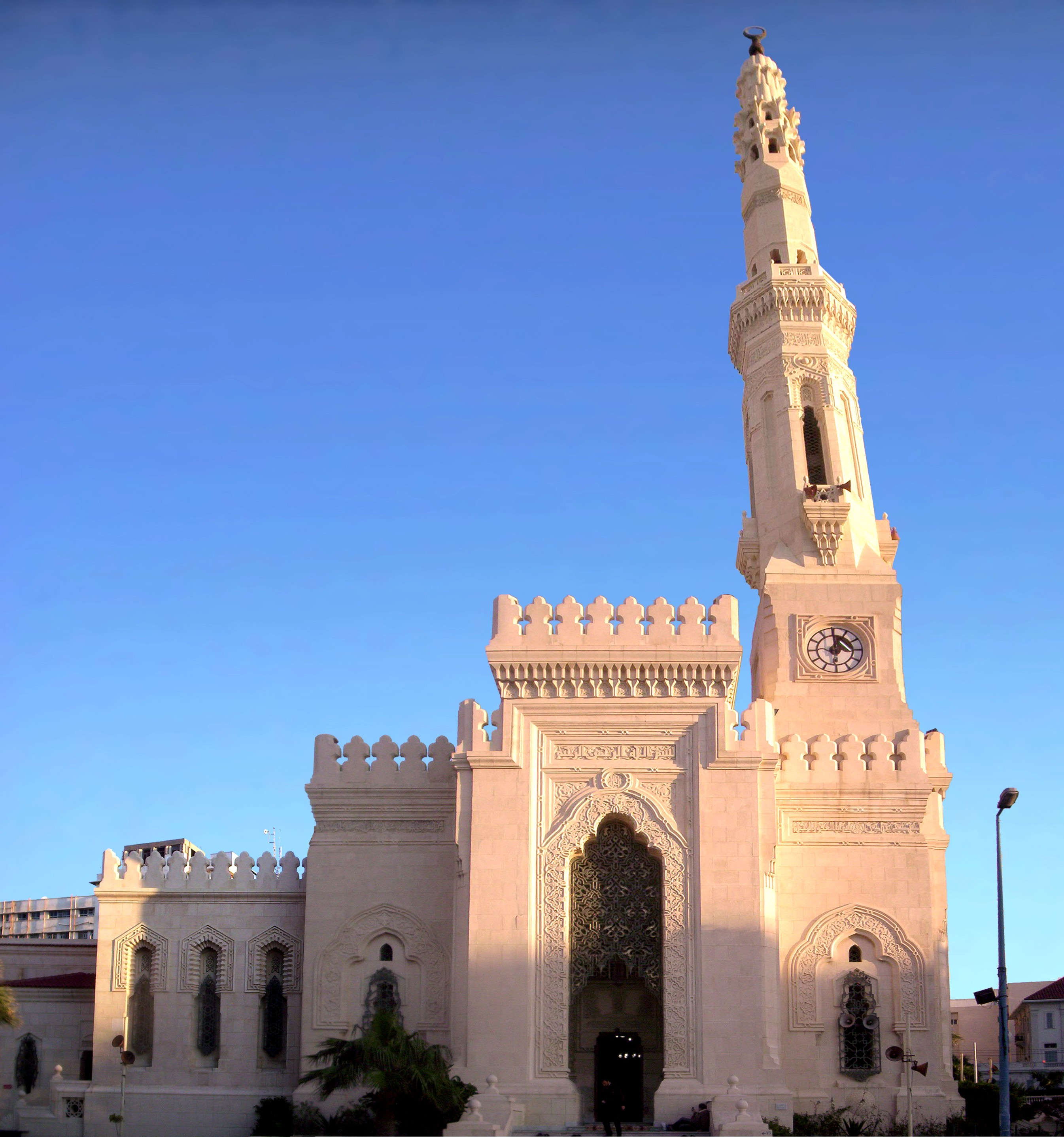 جامع القائد إبراهيم - الواجهة الشمالية الغربية The main North-Western Facade.